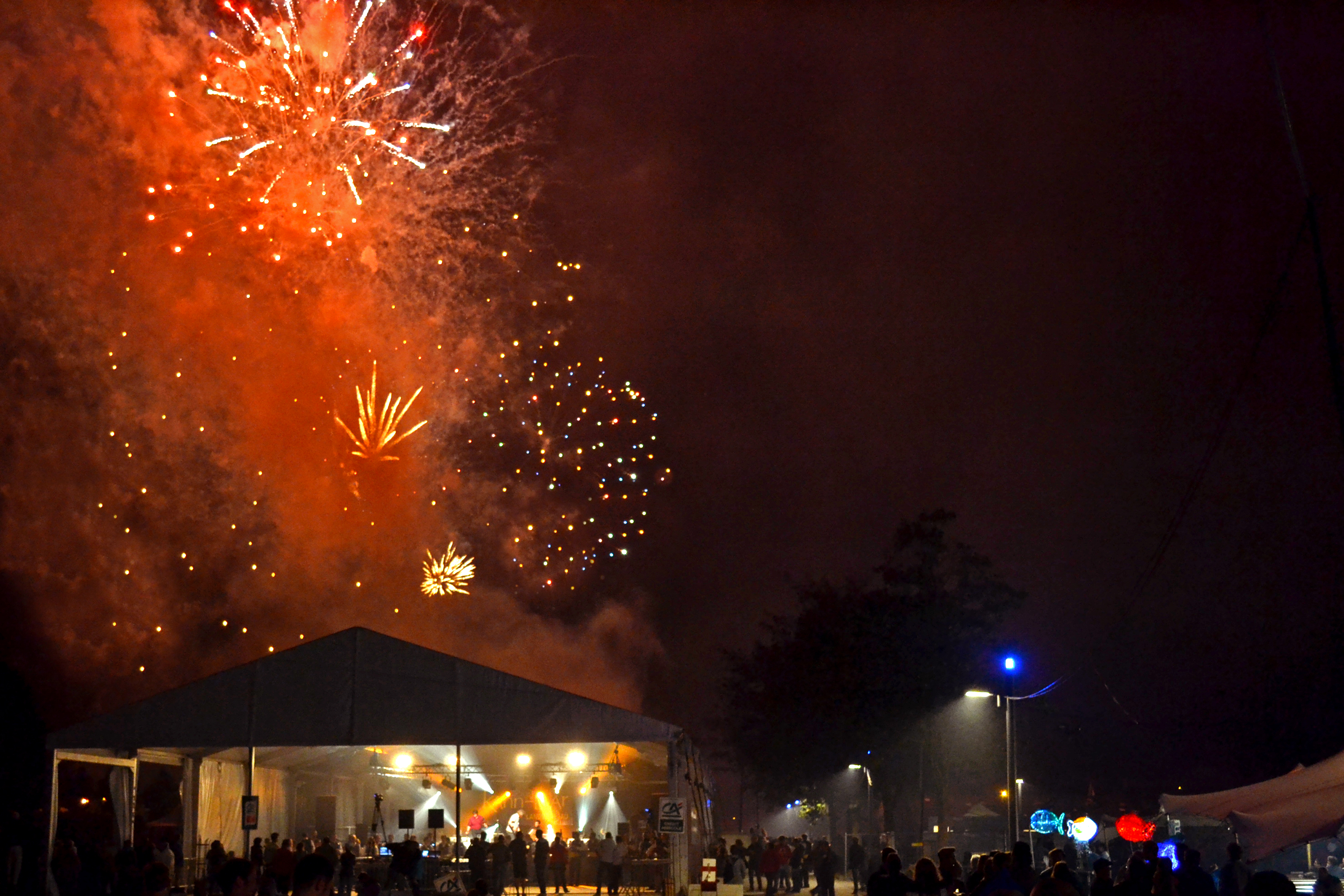 Feu d’artifice au parc urbain de Landerneau pour le Festival Kann Al Loar, après le concert de Merzhin et les 25 ans du Bagad Bro Landerne, le 13 juillet 2015.